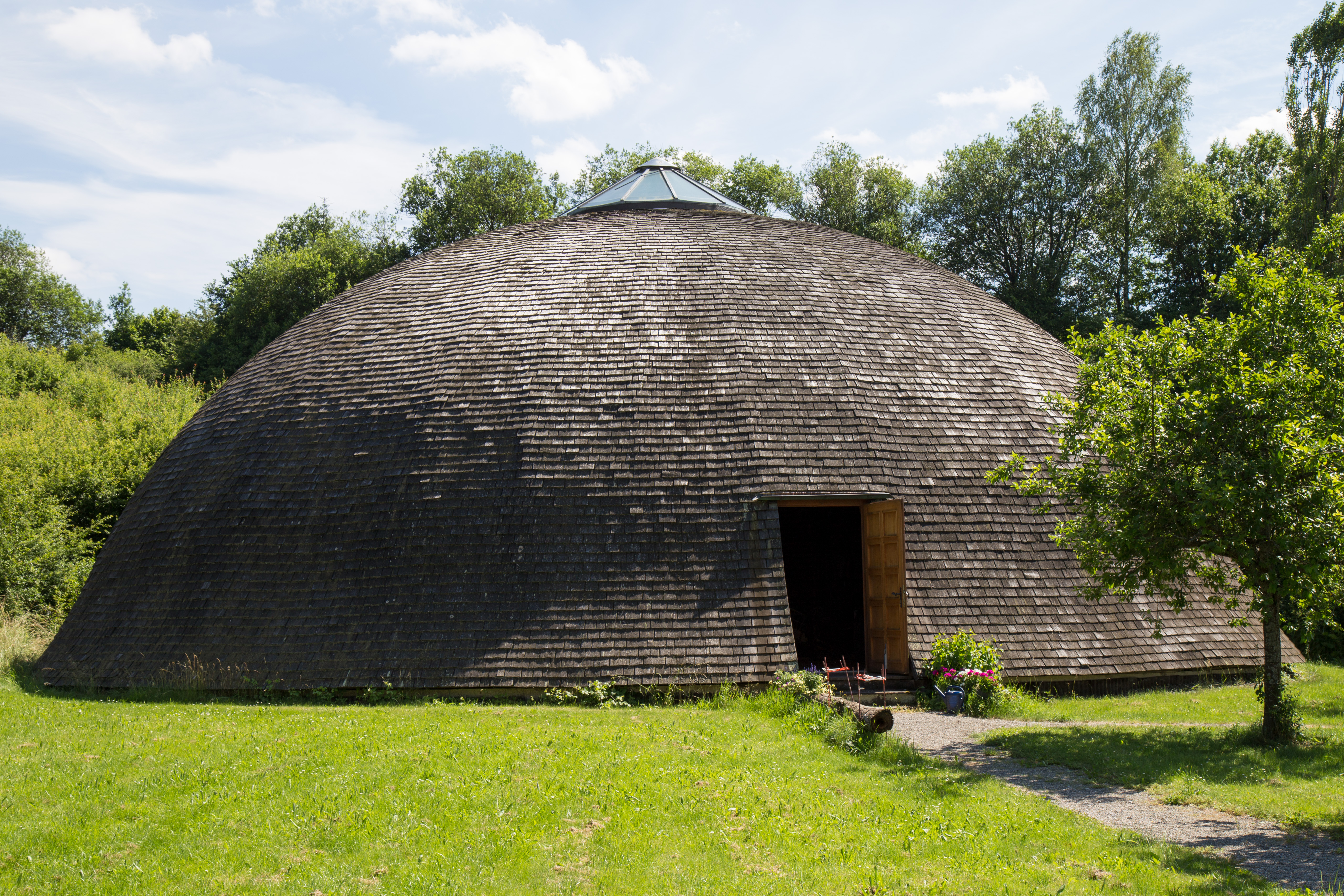 Ehemaliger Solebehälter der Saline Wilhelmshall (heute Salinenmuseum) in Rottweil